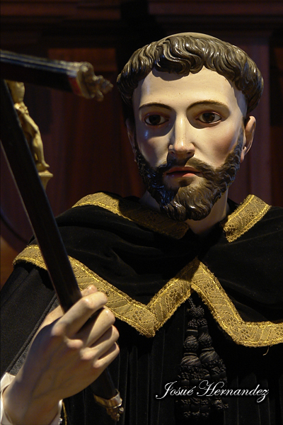 San Plácido Mártir (h. 1847), Fernando Estévez de Salas (1788-1854). Parroquia de San Juan Bautista, San Cristóbal de La Laguna (Tenerife).